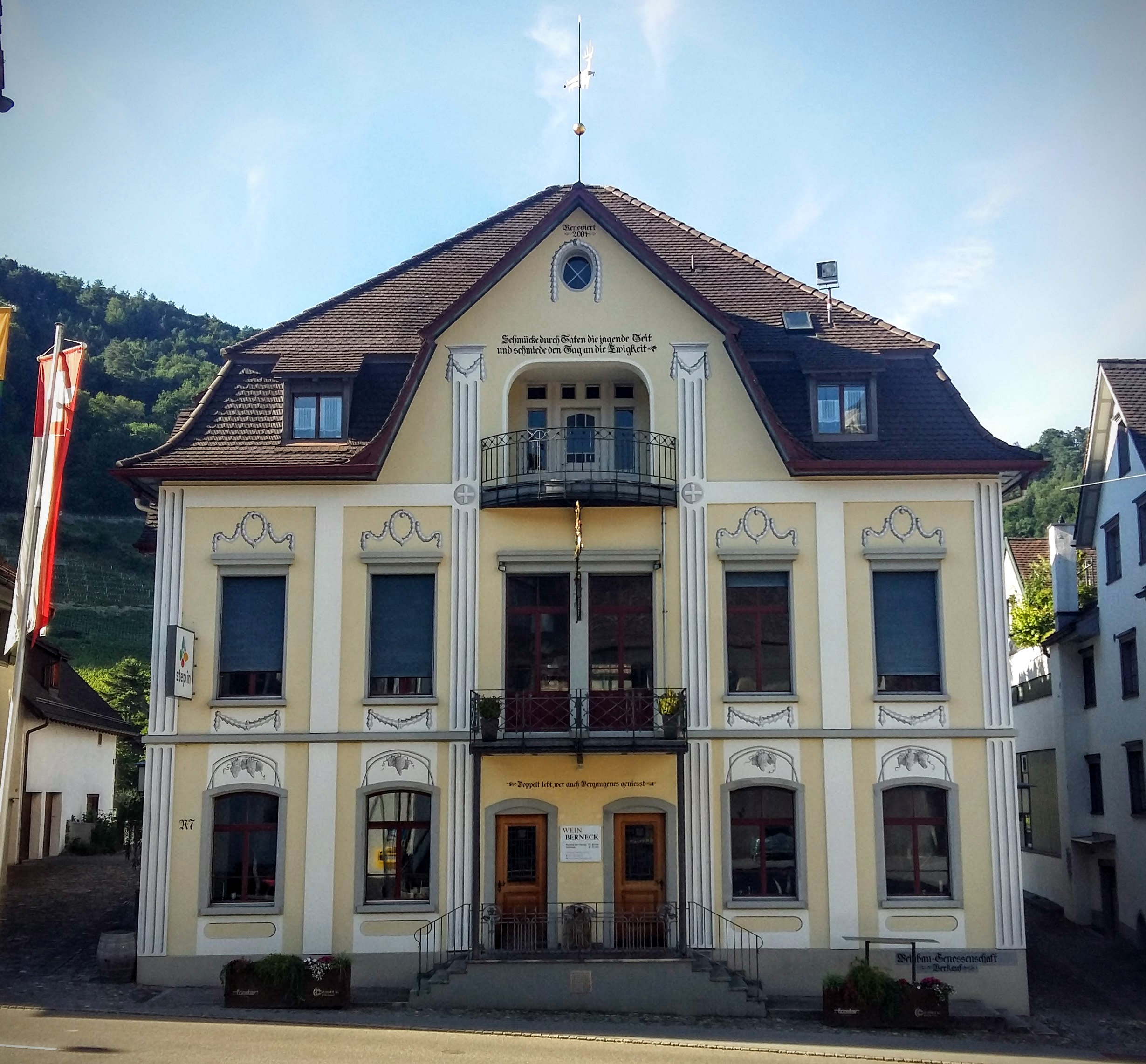 Weinbaugenossenschaft Berneck, Rathausplatz Nr. 7. Ehemals Restaurant Hirschen. Haus im Biedermeier Stil.